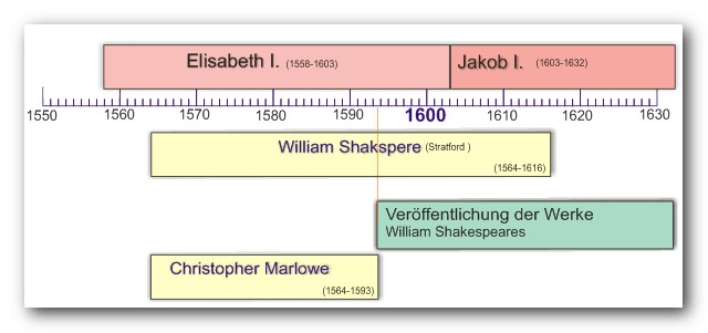 Zeittafel von William Shakespeare und Christopher Marlowe eigne Corel-Draw Grafik